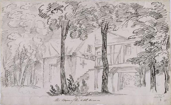 Grange - Hameau de la Reine - Trianon, Versailles